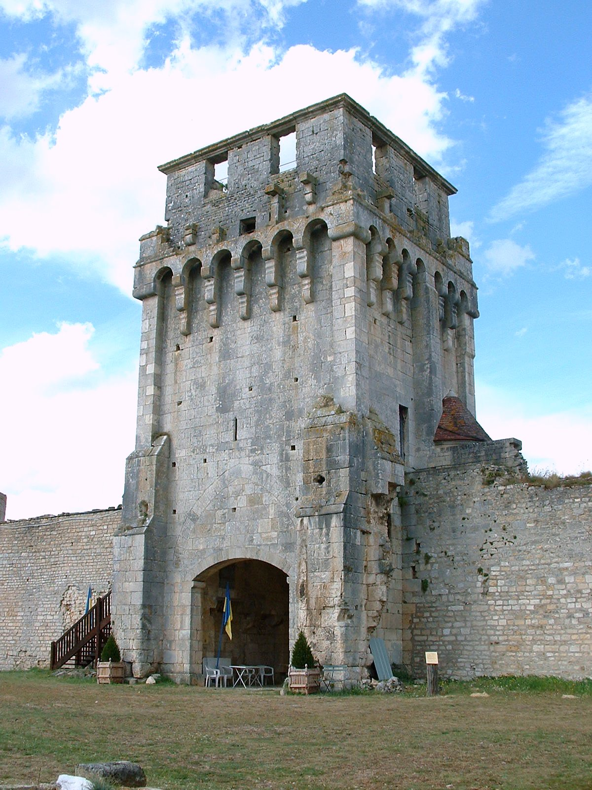 Château-fort de Druyes-les-belles-Fontaines, Yonne) - la tour-porche